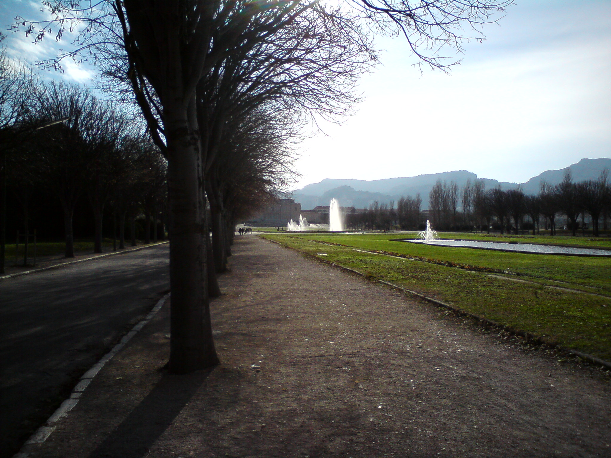 Der Parc Borely mit der Allee und dem Chateau Borely in Marseille